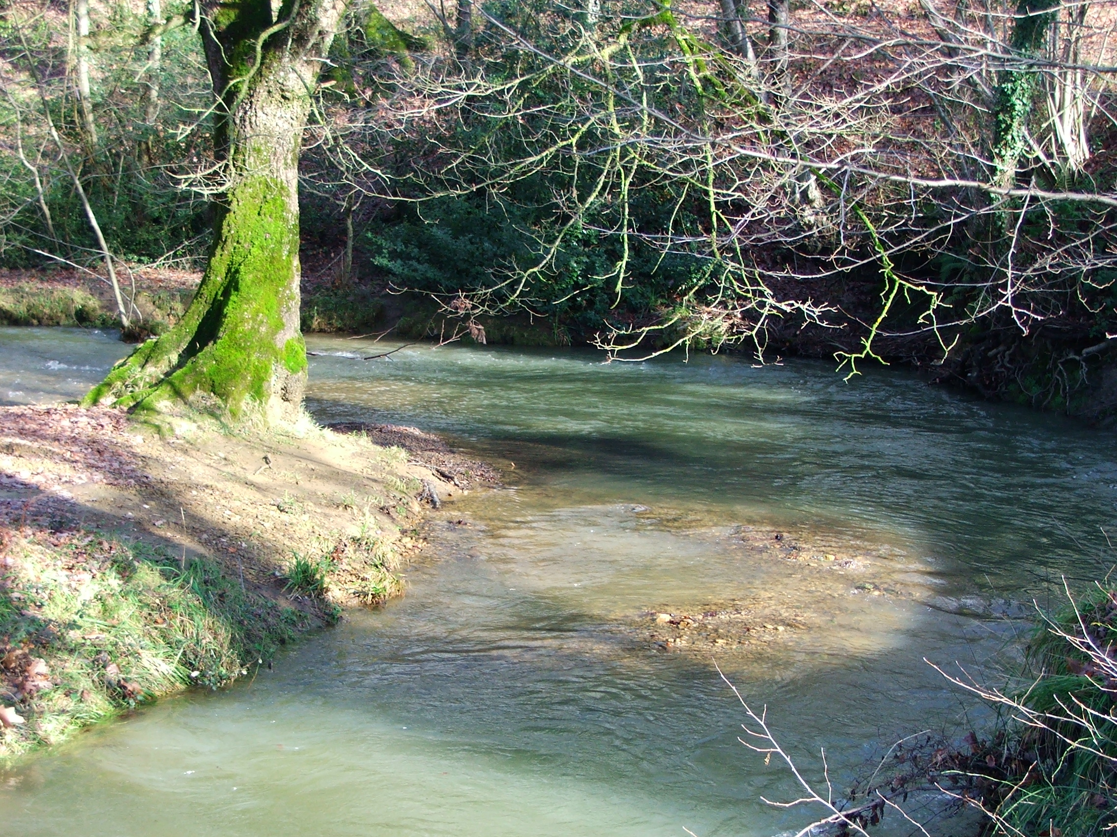 Uzkullu river in Altsasu